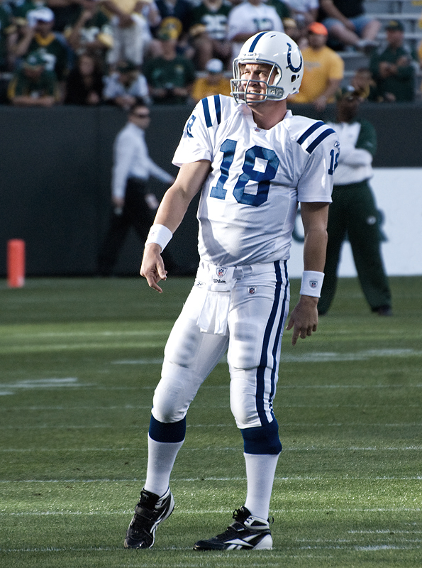 Peyton Manning.